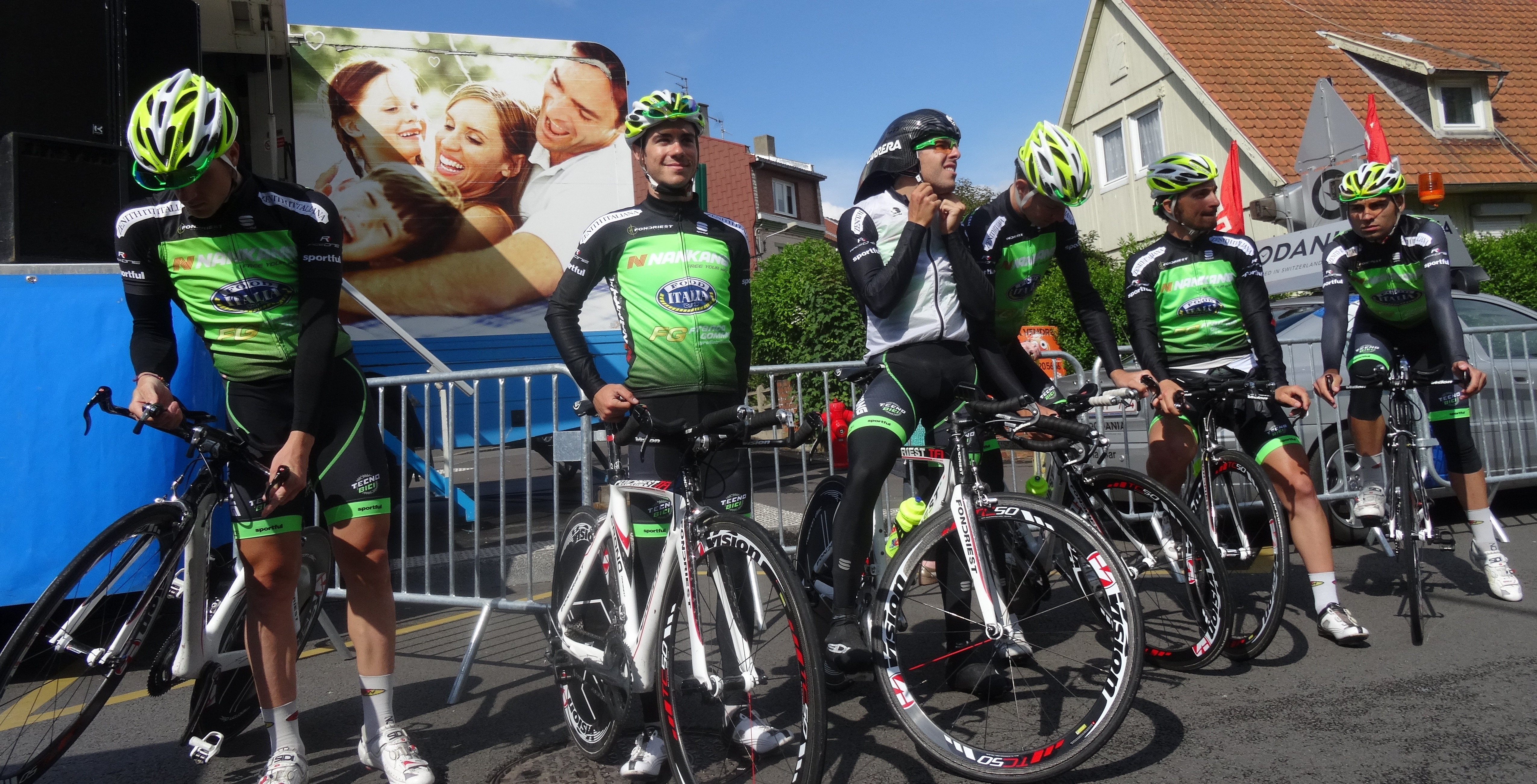 Reportage photographique réalisé le vendredi 23 mai 2014 à l'occasion du départ de la première étape du Paris-Arras Tour 2014 à Lens, Pas-de-Calais, Nord-Pas-de-Calais, France. Depicted team: Nankang-Fondriest